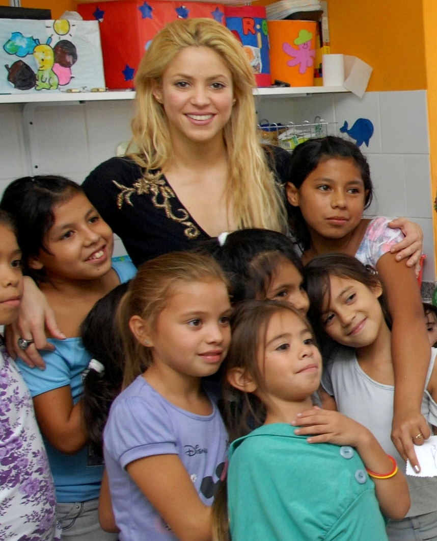 Shakira en un Centro de Primera Infancia.